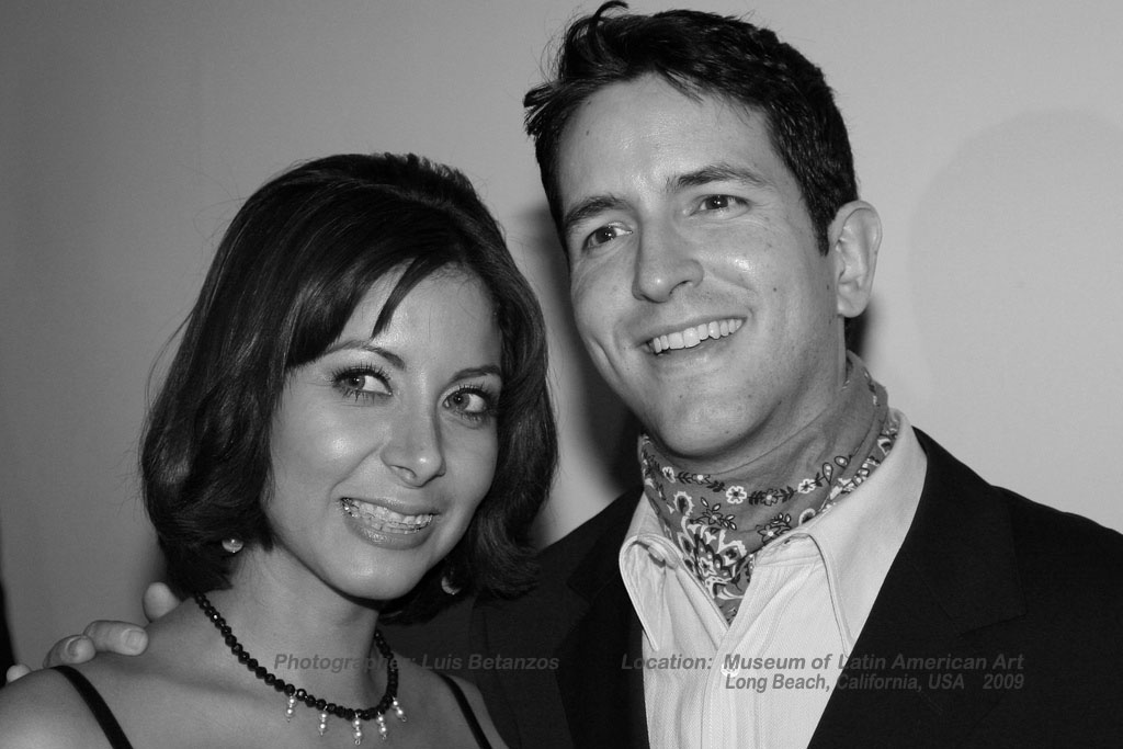 Lorenzo Negrete. MOLAA - Museum of Latin American Art Long Beach, California, USA